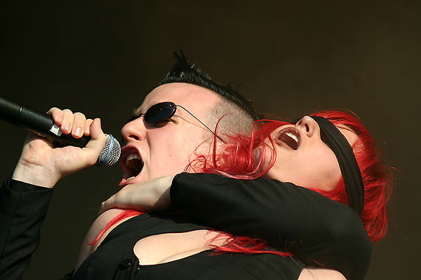 L'Âme Immortelle. Konzertfoto vom Mera Luna 2004.